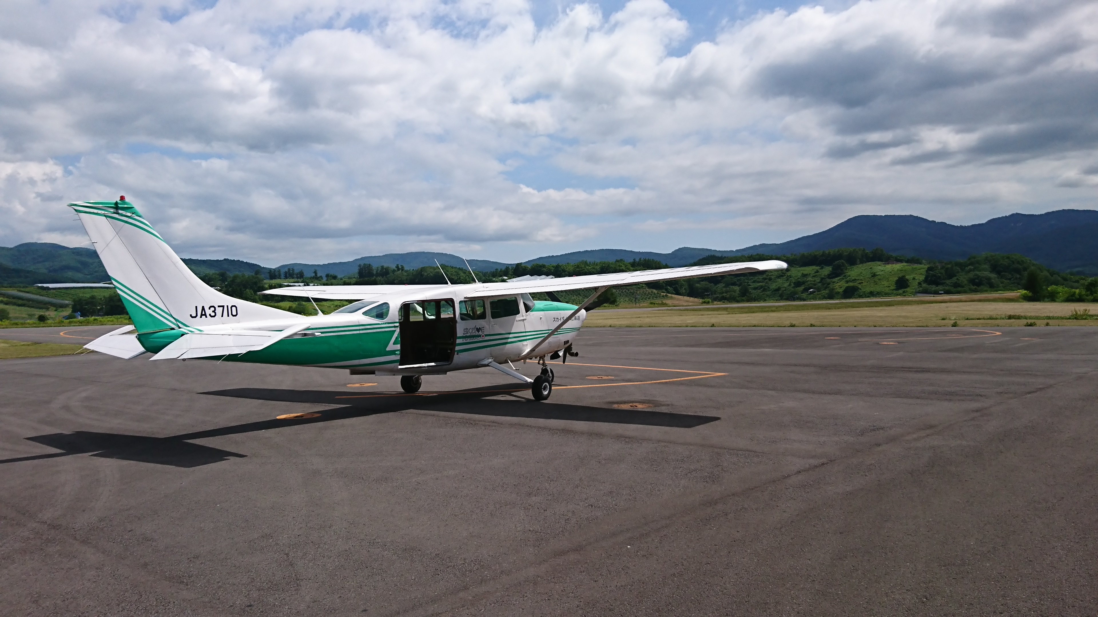 スカイダイビング北海道所有機